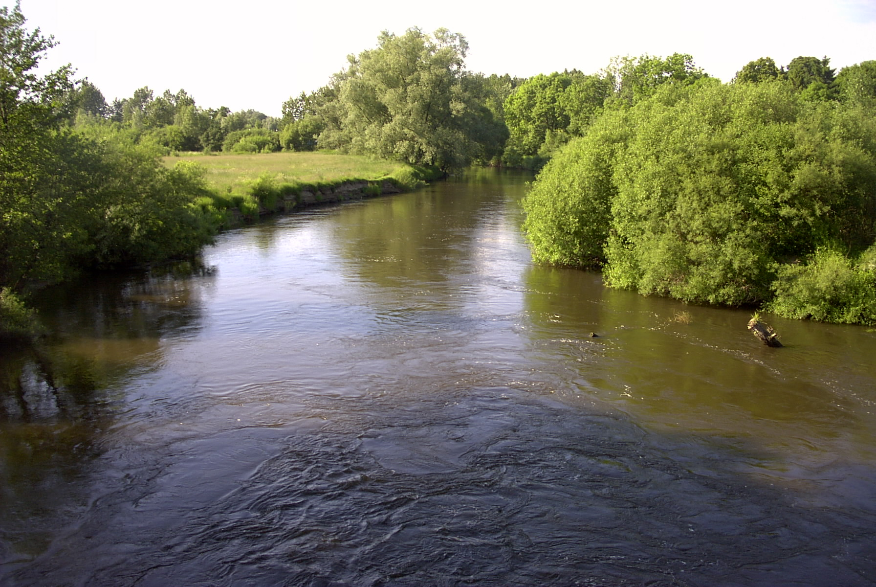 Widok na Parsętę w okolicach Karlina; autor zdjęcia Kluka; 02.02.200r.